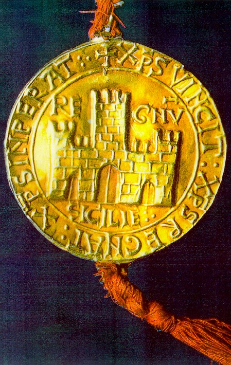 Rückseite der Goldbulle Friedrichs II. als König von Sizilien Verso della bolla d'oro di Federico re di Sicilia